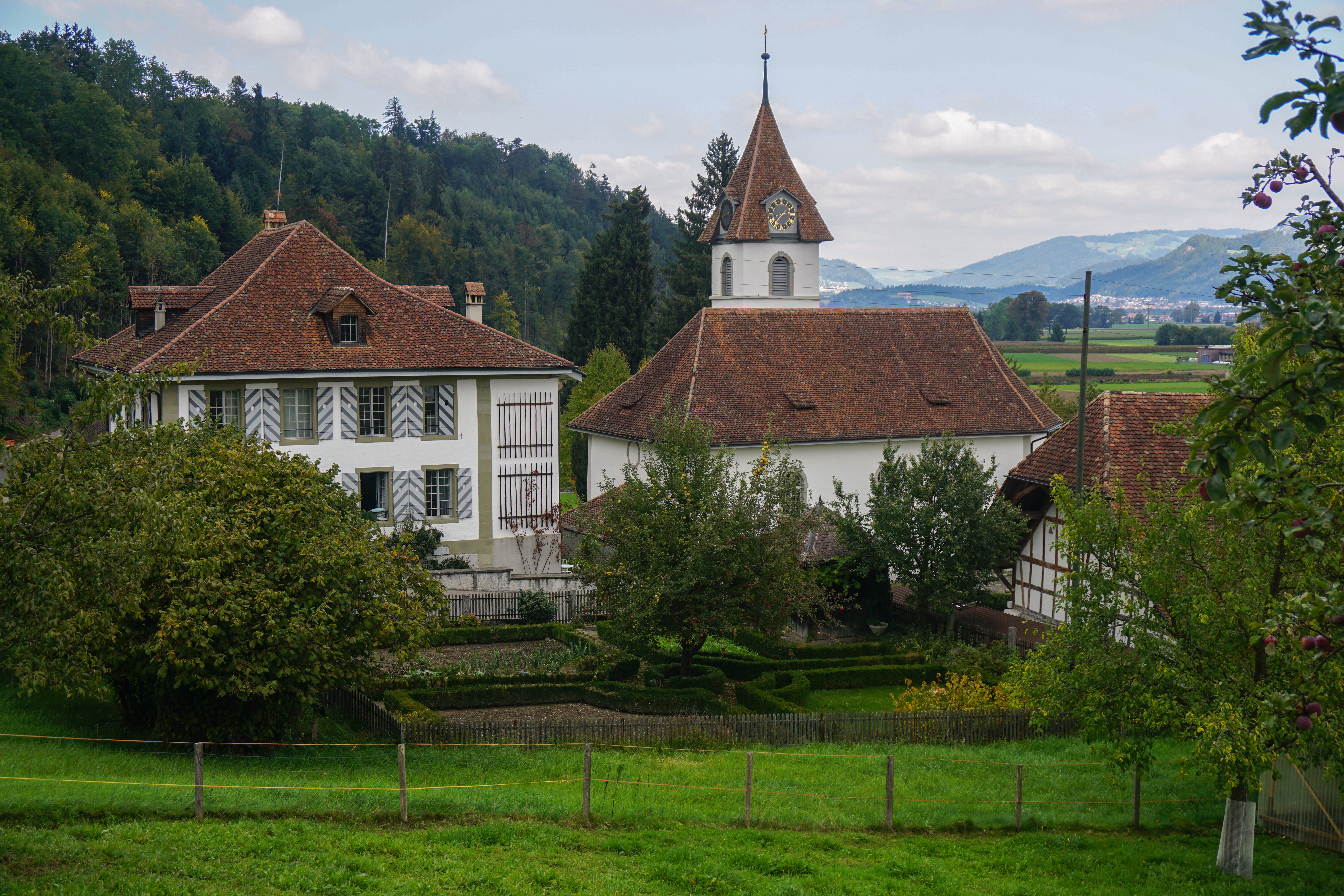 Reformierte Kirche mit Pfarrhaus